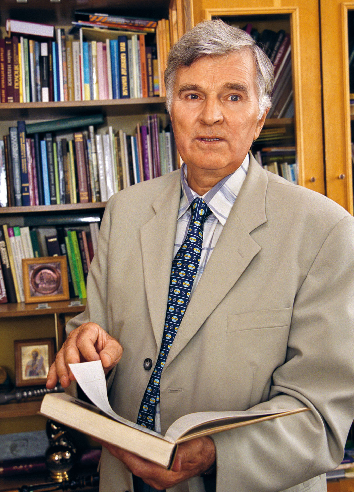 Советский и украинский археолог, историк, профессор (1988), академик НАН Украины (18.05.1990), иностранный член Российской академии наук (22.12.2011), директор Института археологии НАН Украины.